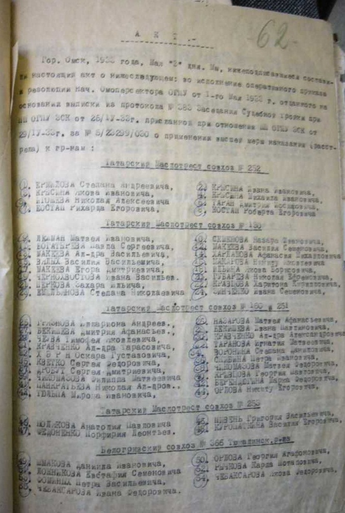 Первая страница из Акт о расстреле 281 человека 3-го, 4-го и 5-го мая 1933 года в Омской области по делу о "заговоре в сельском хозяйстве"